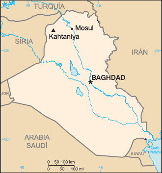 Map of Iraq, marking Kahtaniya